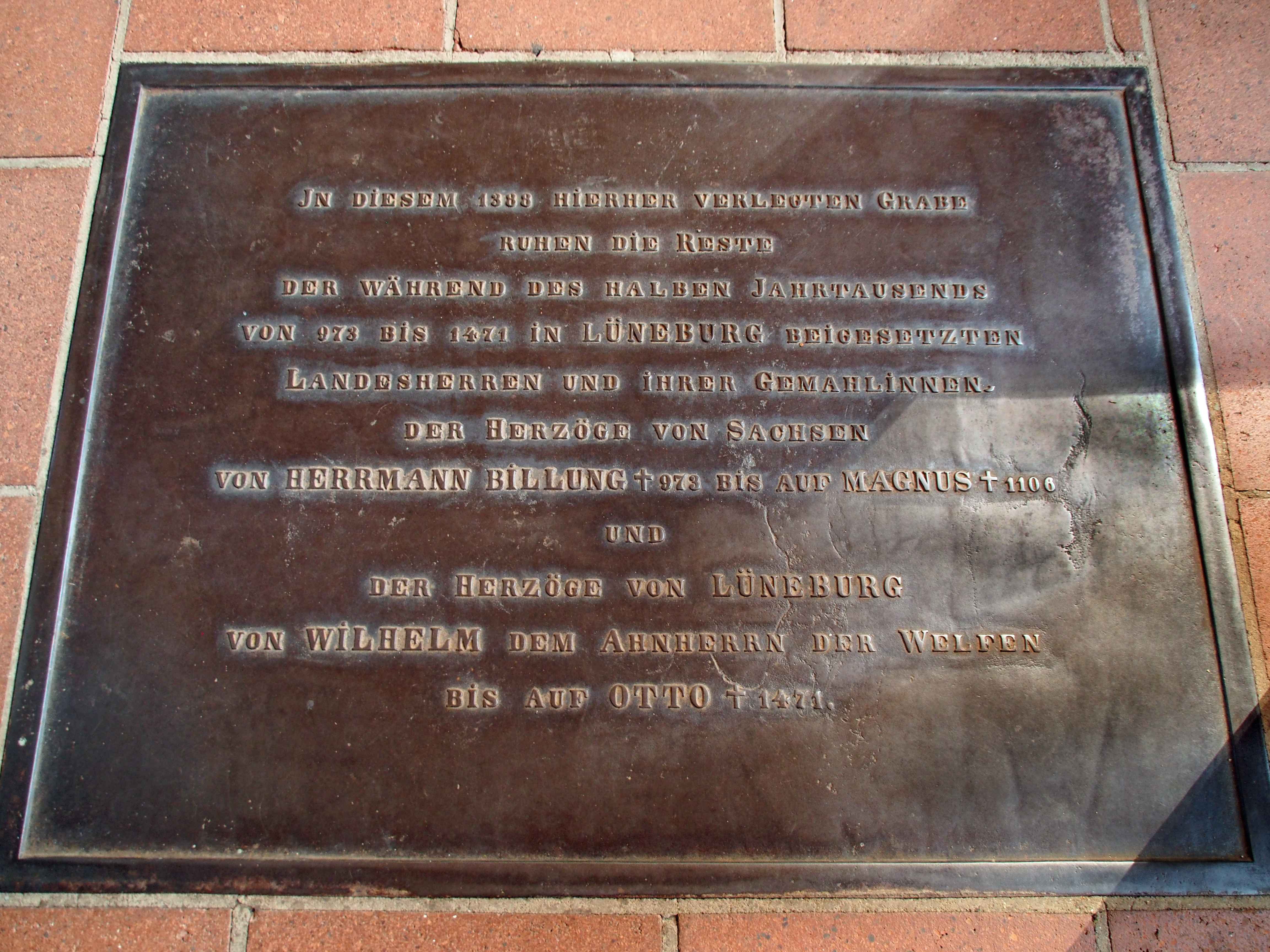 Grabtafel der Herzöge von Sachsen (973-1106) in der St. Michaeliskirche Lüneburg